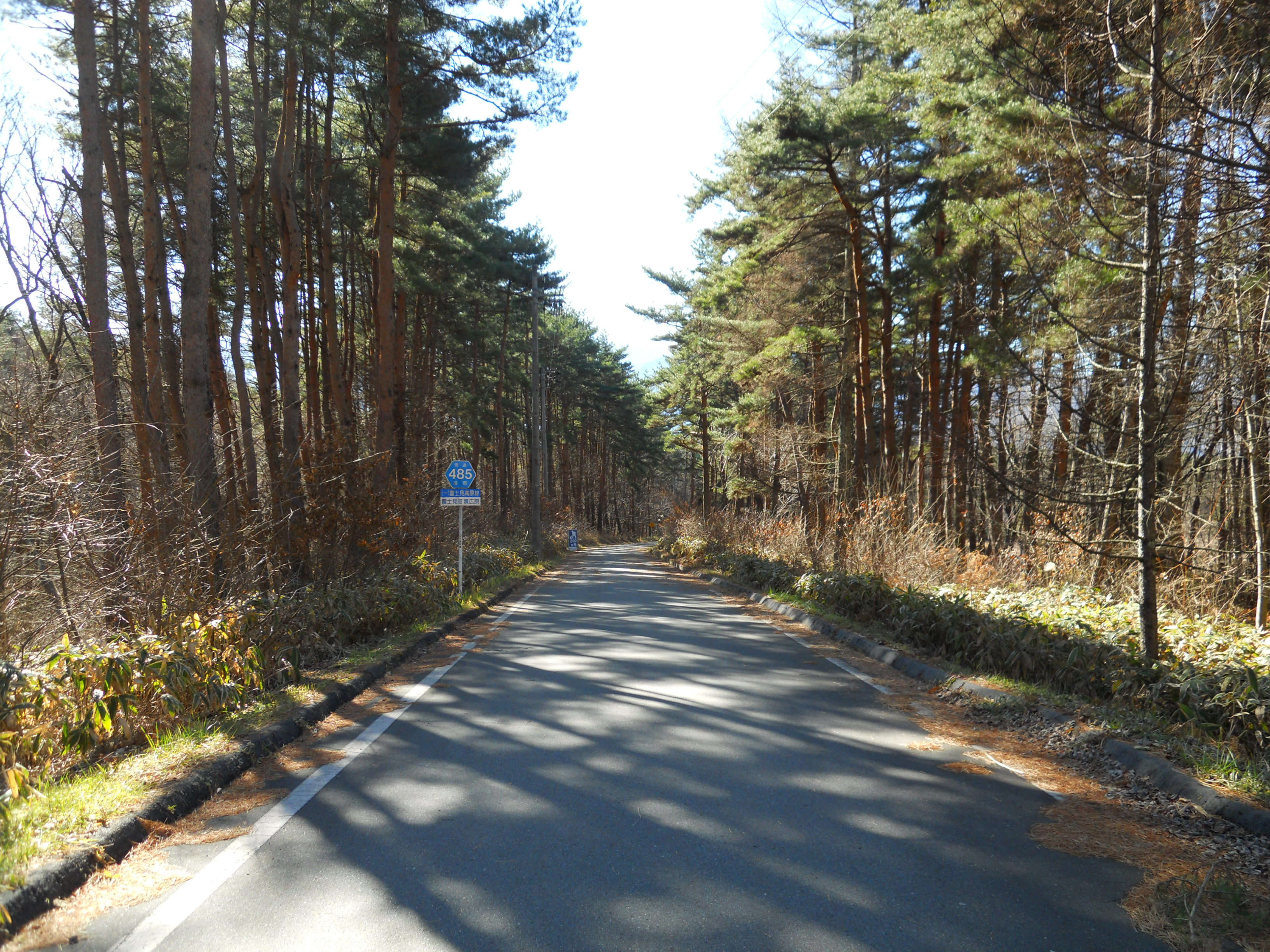 長野県道485号起点付近